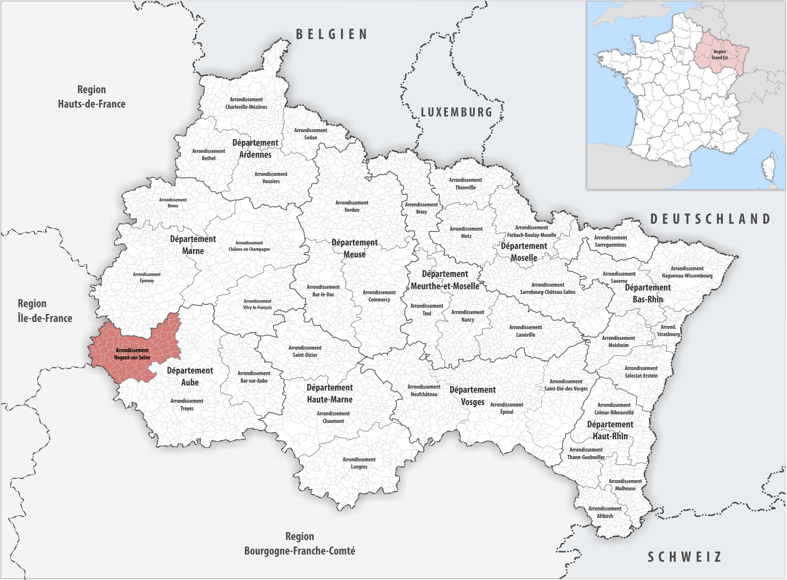 Lage des Arrondissements Nogent-sur-Seine